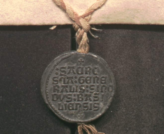 Bulla soboru bazylejskiego. Bulla soboru bazylejskiego na biało-czerwonym sznurze. Legenda: : SACROSCA : GENERALIS : SINODVS : BASILIENSIS